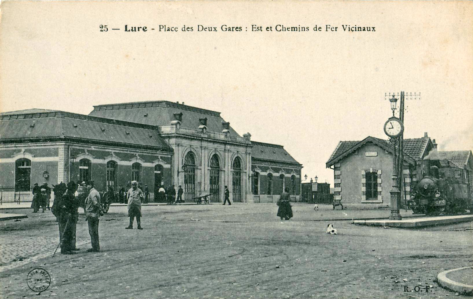 Carte postale ancienne éditée par ROF, n°25 : LURE - Place des Deux Gares : Est et Chemins de fer vicinaux